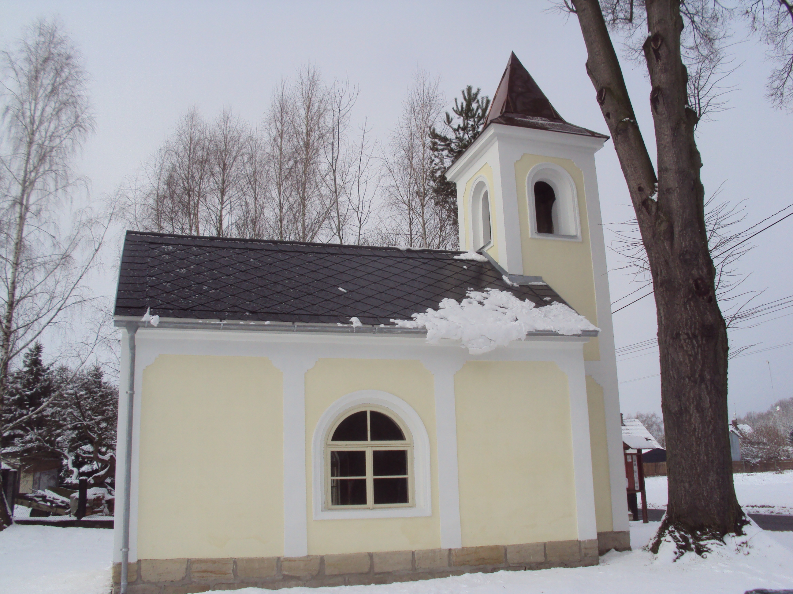 Kaple Nejsvětější Trojice v Manušicích u České Lípy po renovaci